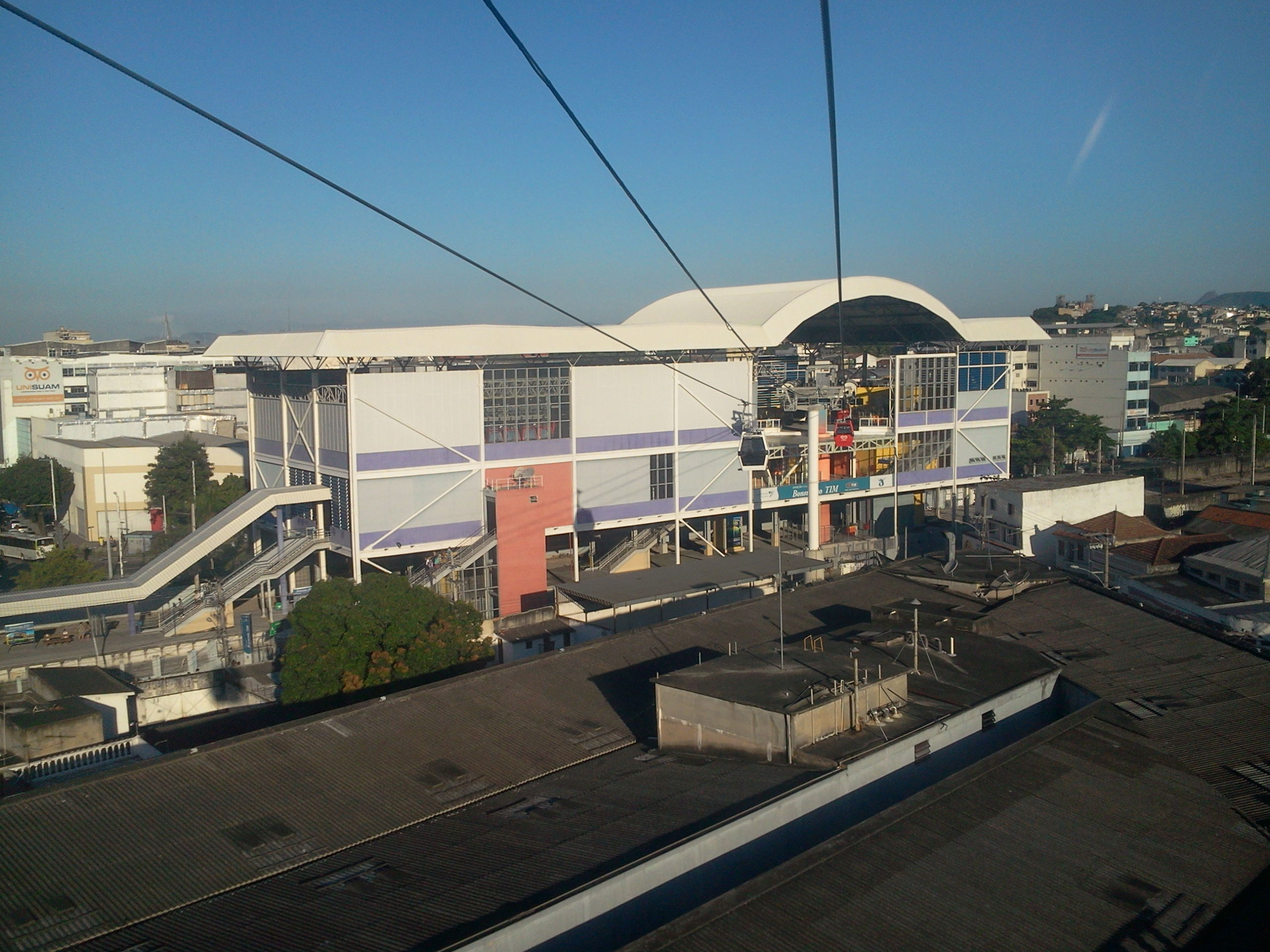 Estação de Bonsucesso, visto das gondolas do teleférico.